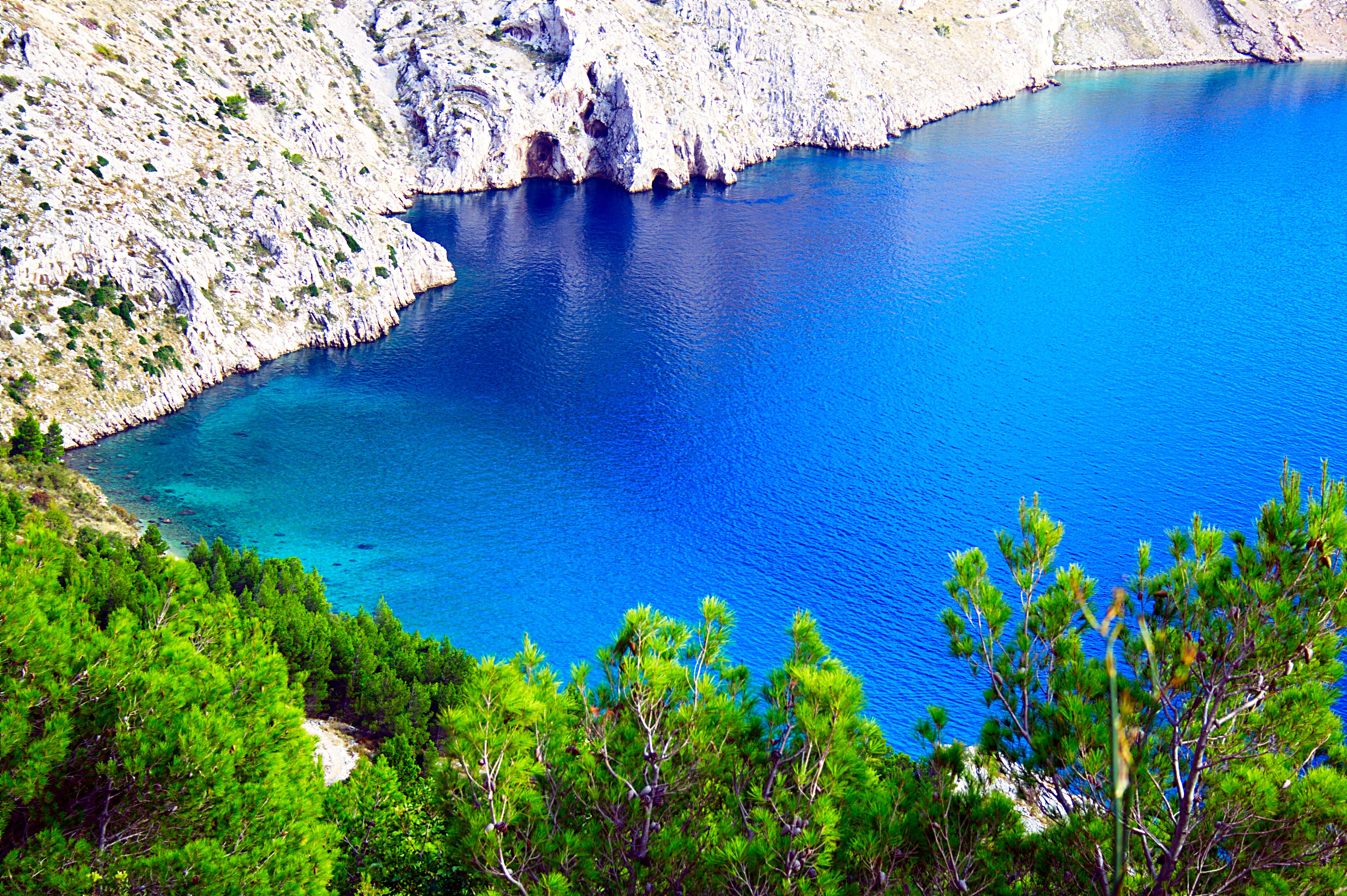 Adria_zwischen_Omis_und_Makarska